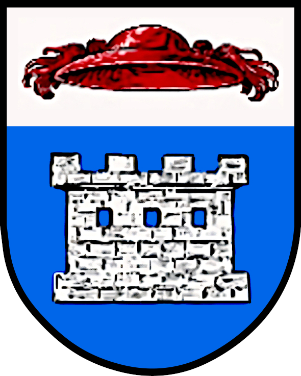 Hinter dem Ortsnamen Haus verbirgt sich eine über 1000-jährige Geschichte. Die erste urkundliche Erwähnung des Marktes stammt aus dem Jahr 928, wonach ein bayrischer Adeliger seine Besitzungen mit einem befestigten Gebäude (im damaligen Sprachgebrauch "hus") dem Salzburger Erzbischof überließ. Von da an dauerte der salzburgisch-erzbischöfliche Machteinfluß bis zur Aufhebung des geistlichen Fürstentums Salzburg im Jahr 1803. Aus diesen historischen Tatsachen erklärt sich auch die Sinngebung des Gemeindewappens.